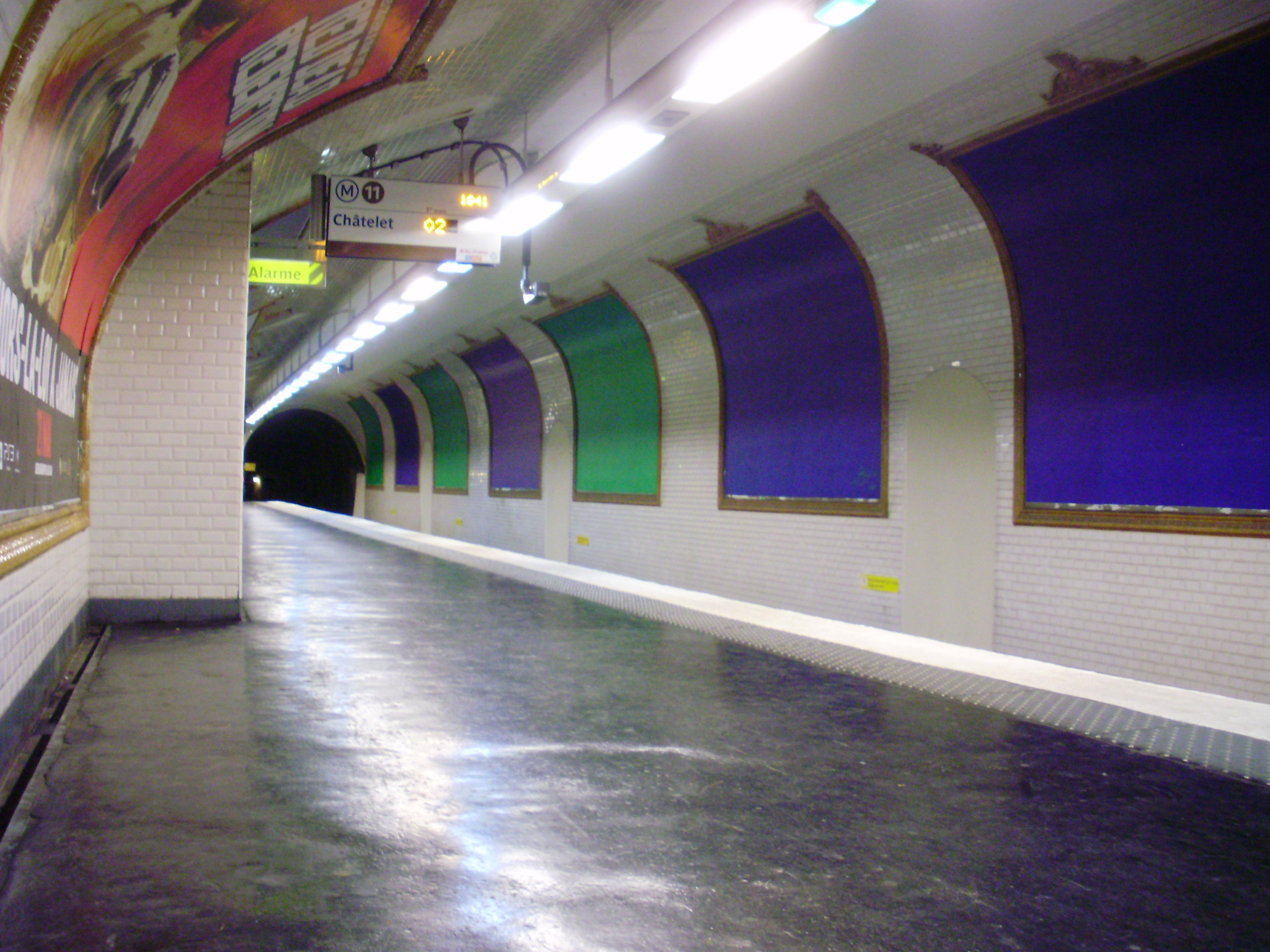 Quai en direction de Châtelet de la station « Télégraphe » du métro de Paris